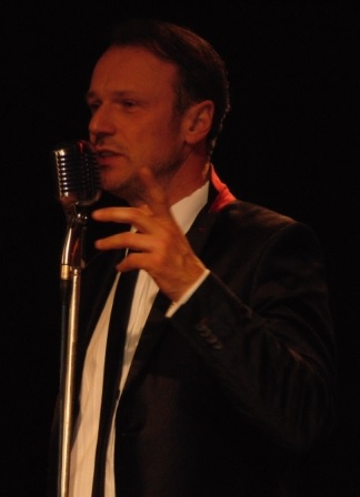 Damian Holecki - portret